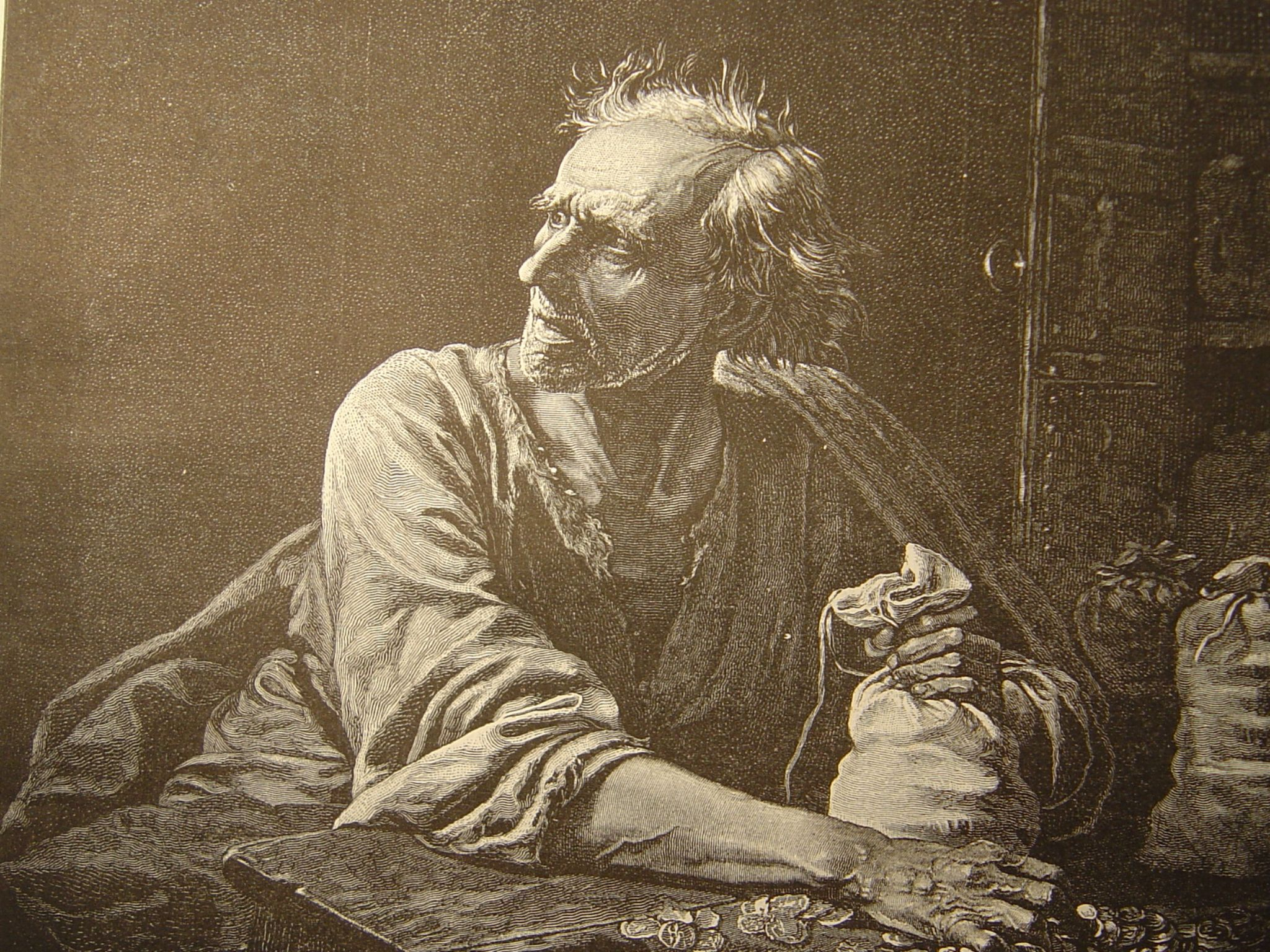 Quand il fut sur le lit de mort et fut apporter ses sacs remplis de pièces d'or et s'écria en passant les main dessus " hélas , faut-il que je vous quitte mes chers agneaux"